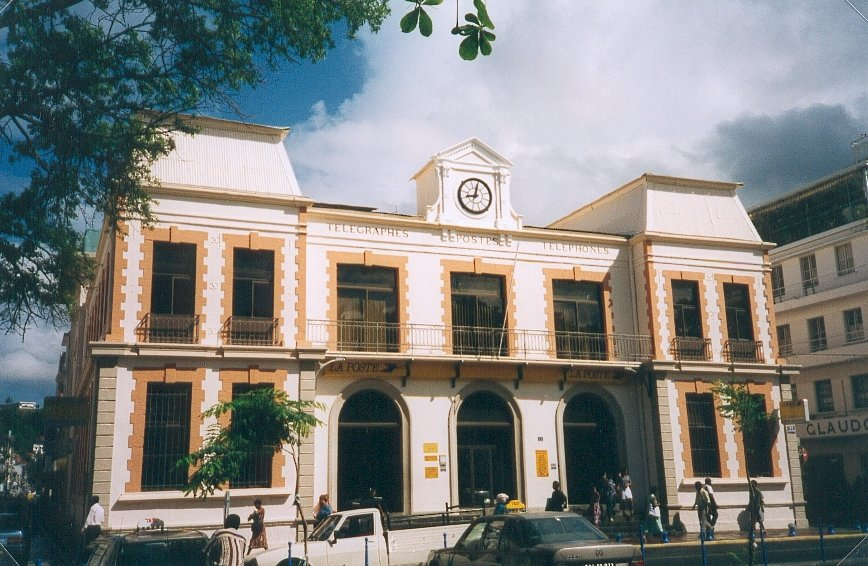 FC Georgio 1997 Cette photo peut être reproduite en mentionnant son auteur